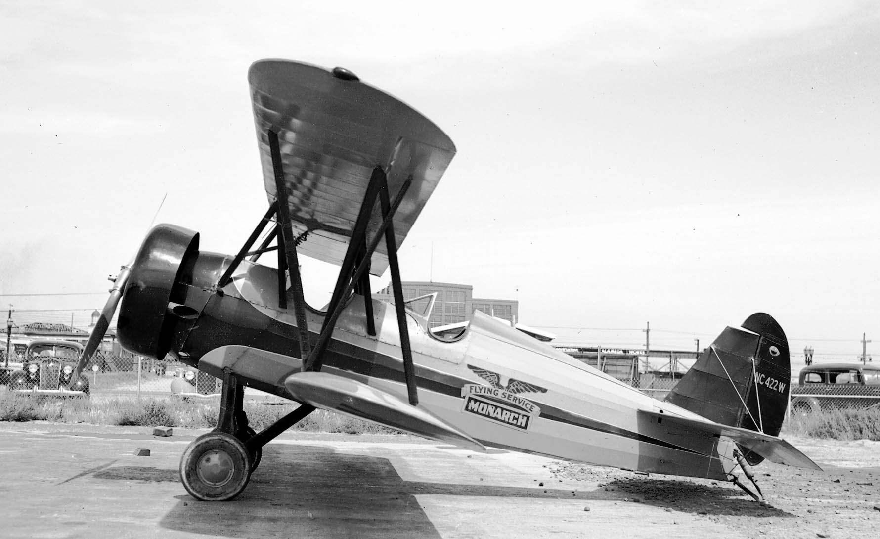 San Francisco Bay Airdrome, Alameda, CA 1939.